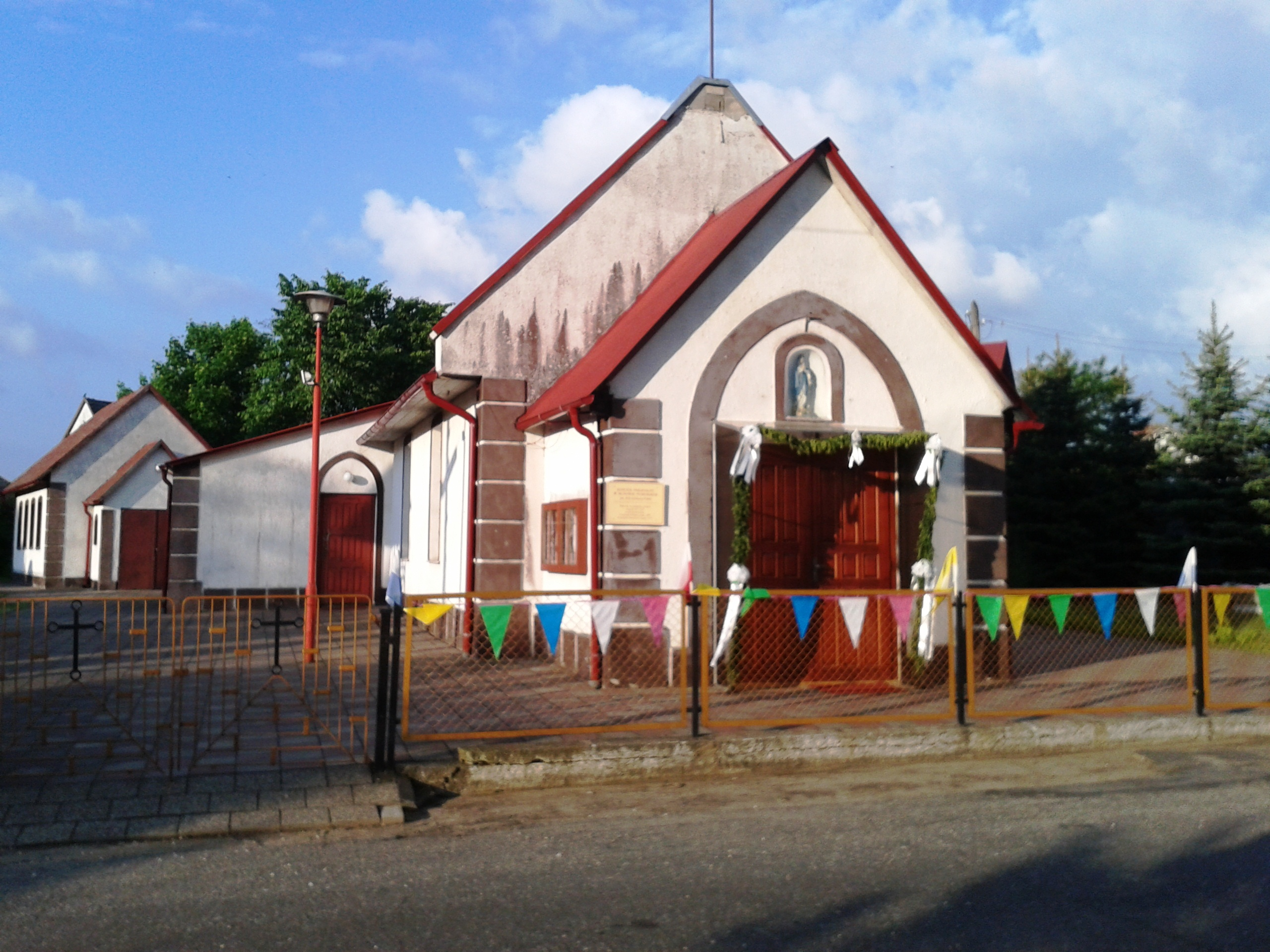 Runowo Pomorskie - rzymskokatolicki kościół parafialny p.w. MB Królowej Polski